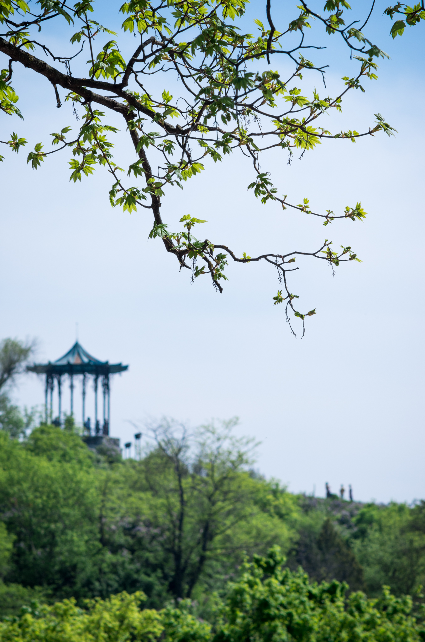 Вид на "Китайскую" беседку в Пятигорске.